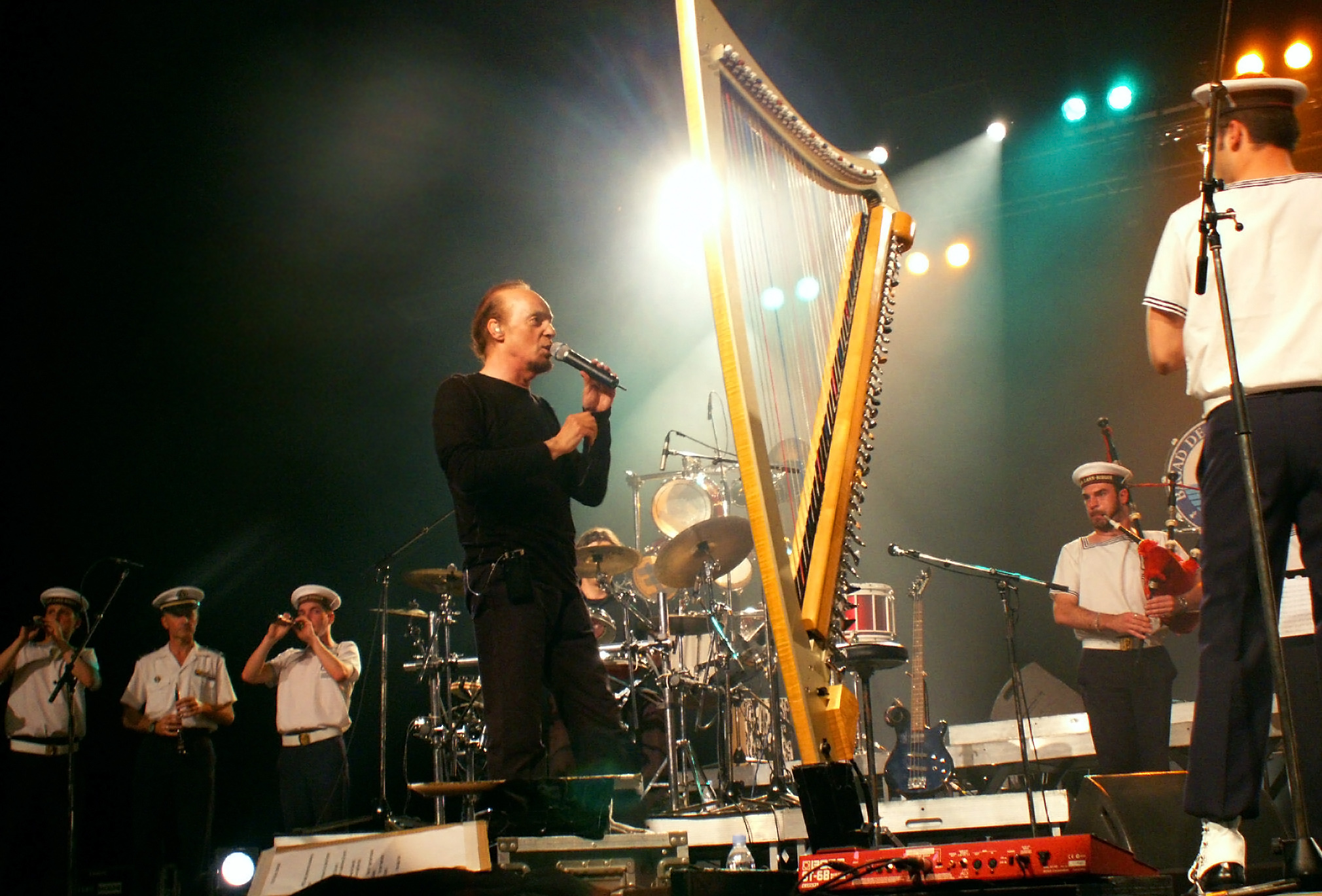 Alan Stivell en concert à Brest avec le bagad de Lann-Bihoué en 2007.